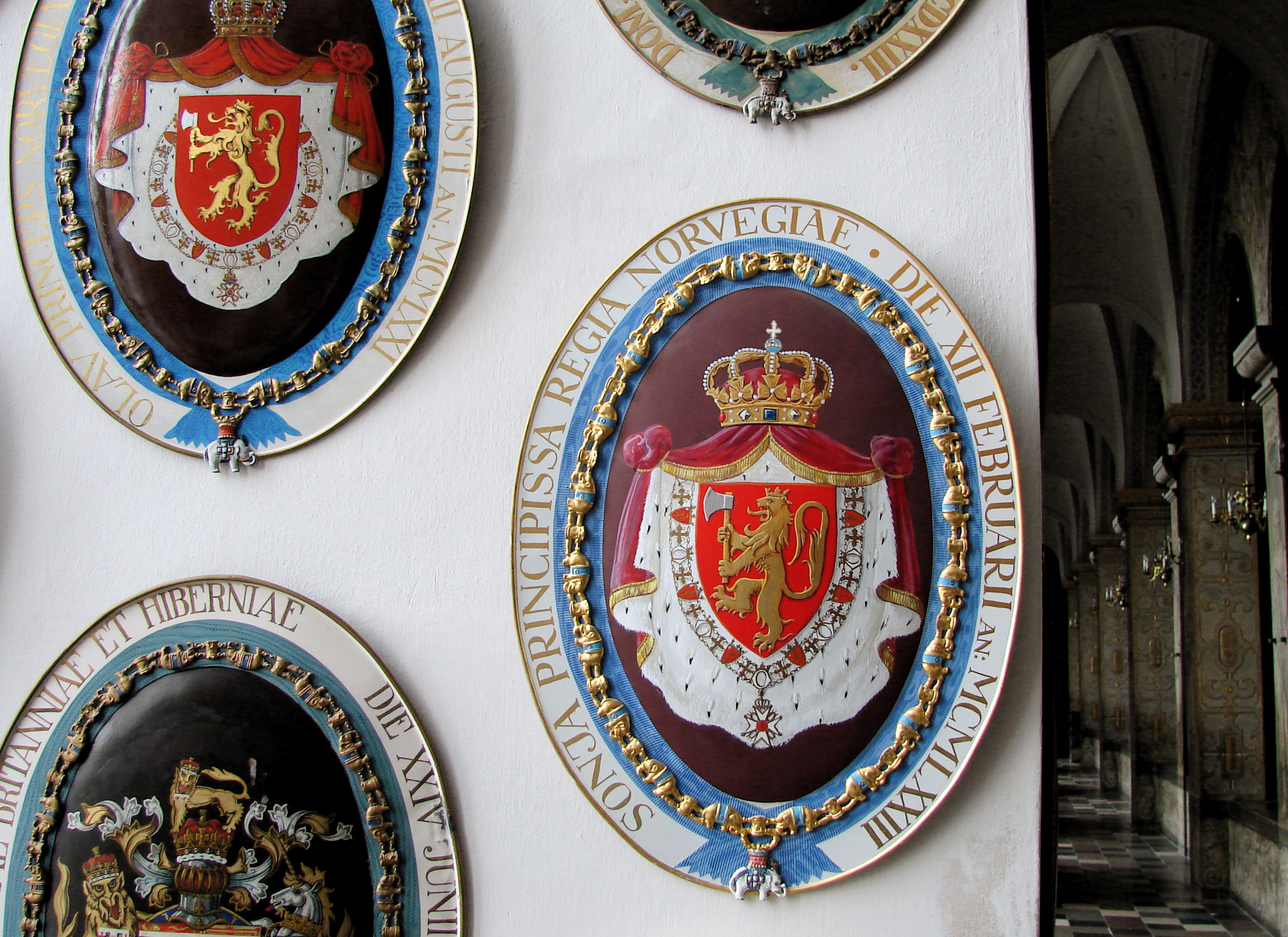 SONJA PRINCIPISSA REGIA NORVEGIAE · DIE XII FEBRUARII AN: MCMLXXIII, Frederiksborg Slotskirke, Hillerød, Danmark